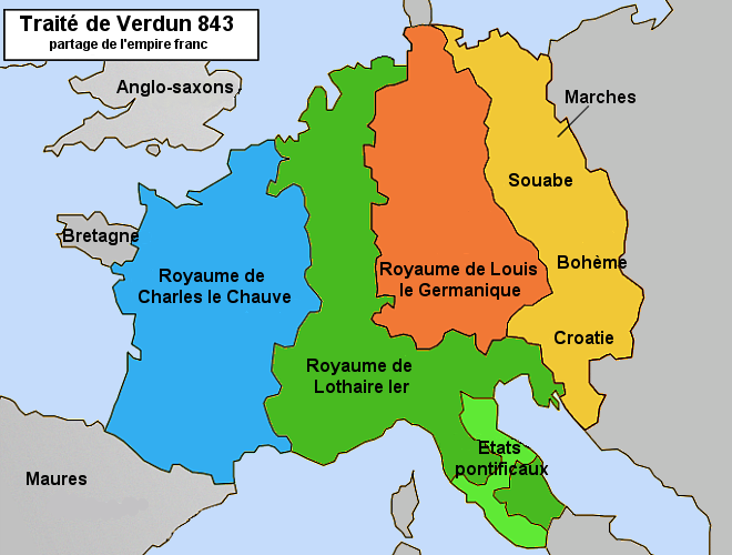 Traité de Verdun, partage de l'Empire de Charlemagne.